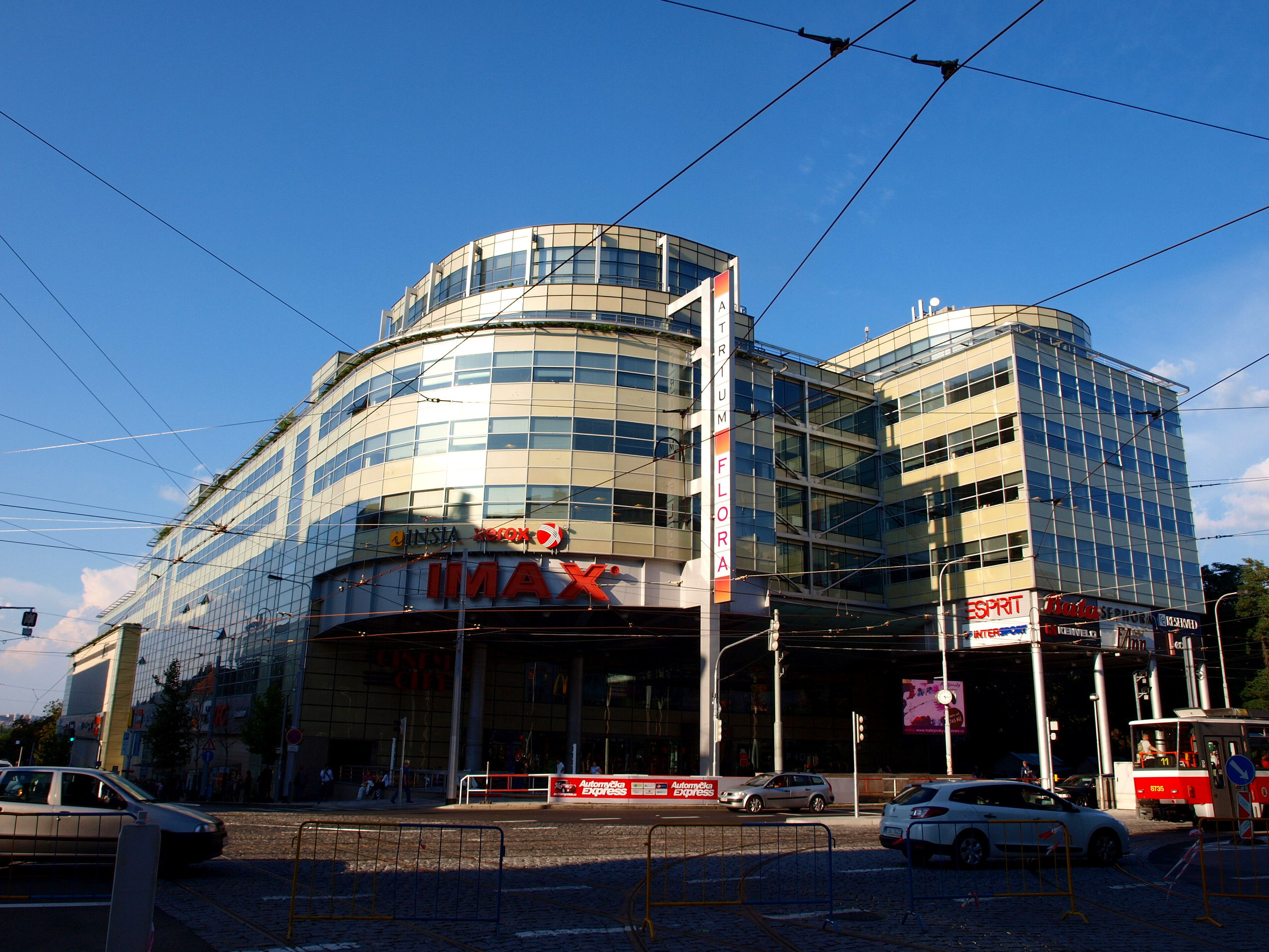 Palác Flora